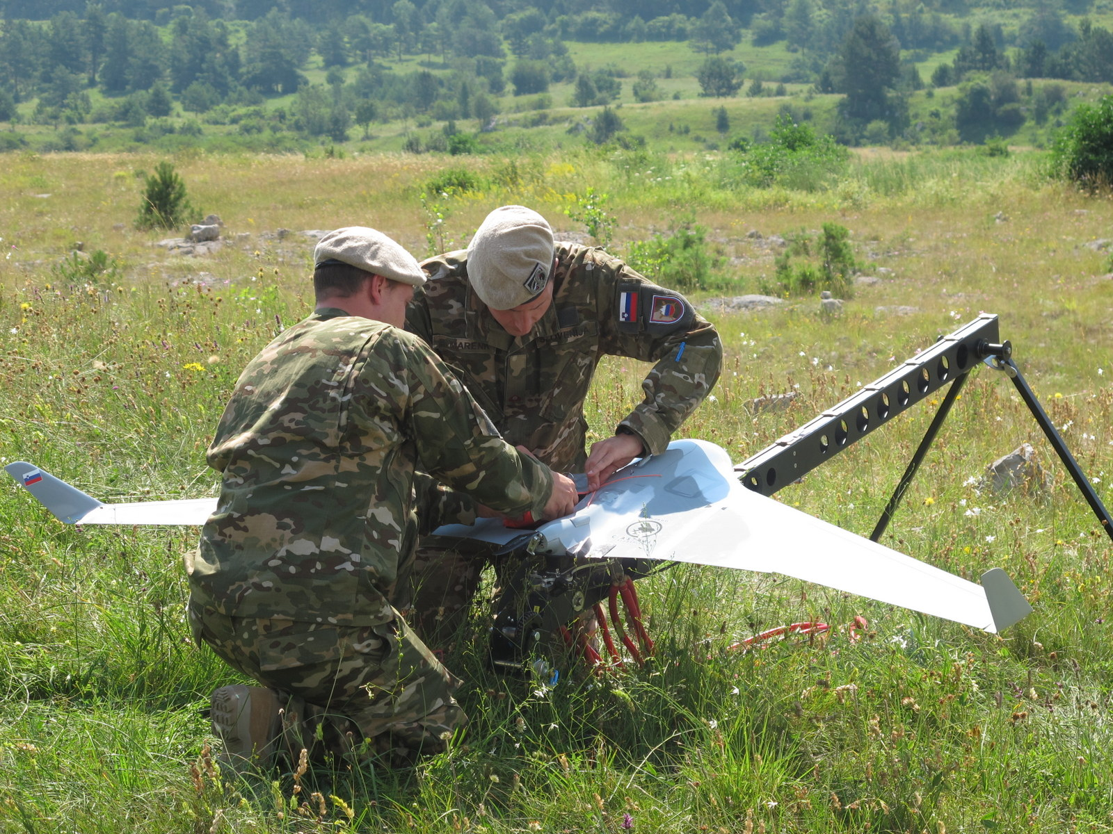 Na Baču predstavili brezpilotne letalnike Belin.